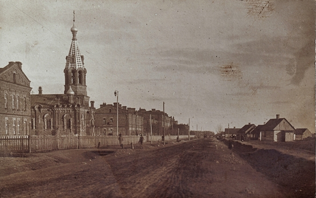 Garnizon Przasnysz, 1912r. Rosyjski kompleks koszarowy przy trakcie makowskim